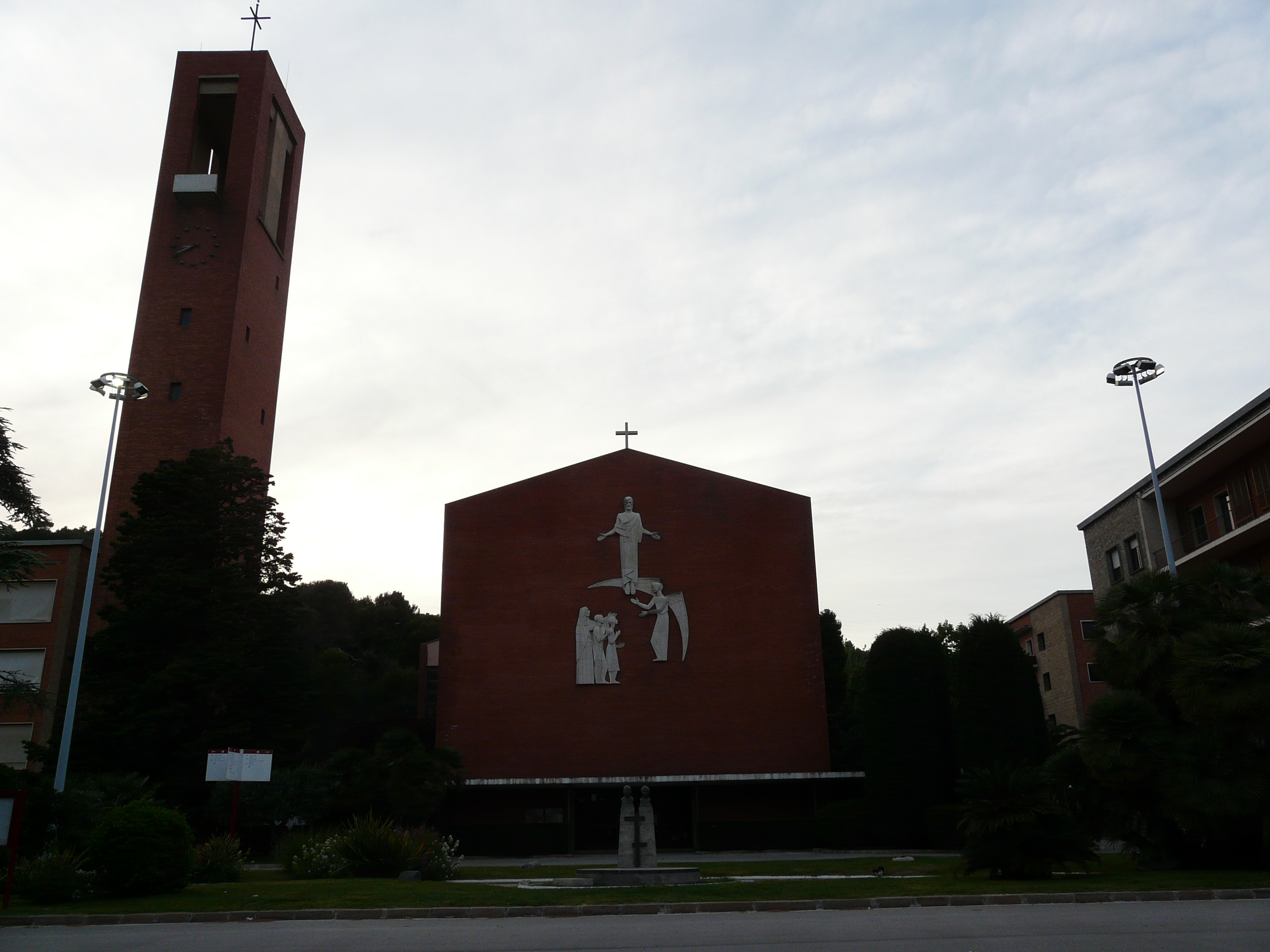 Escultures de la façana de l'església. Pg. de la Vall d'Hebron 171 -Campus Mundet, església- (Barcelona). Escultor: Eudald Serra. Arquitecte; Manuel Baldrich. 1958. 84″ N, 2° 08′ 37.48″ E